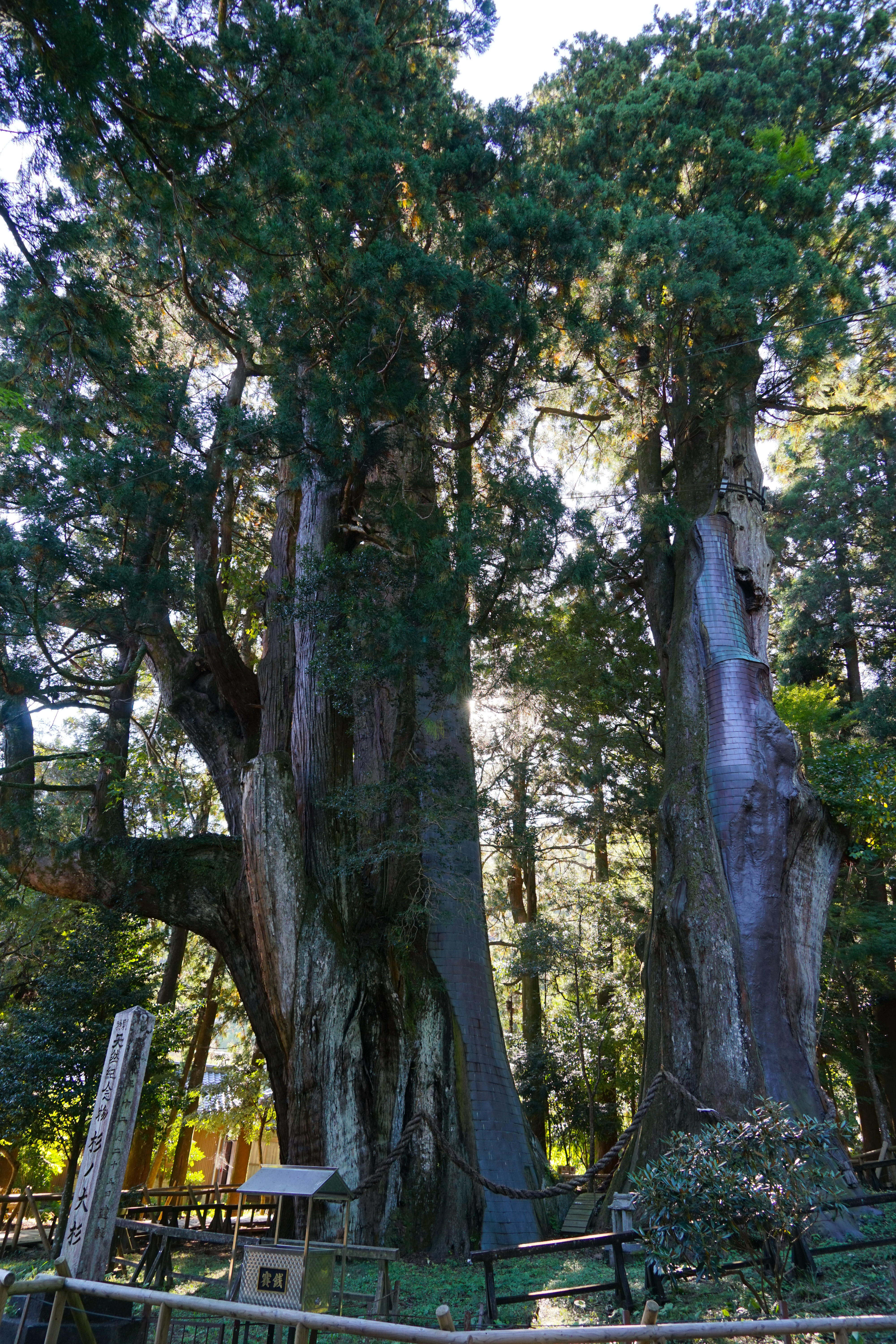 杉の大杉（大豊町大杉）